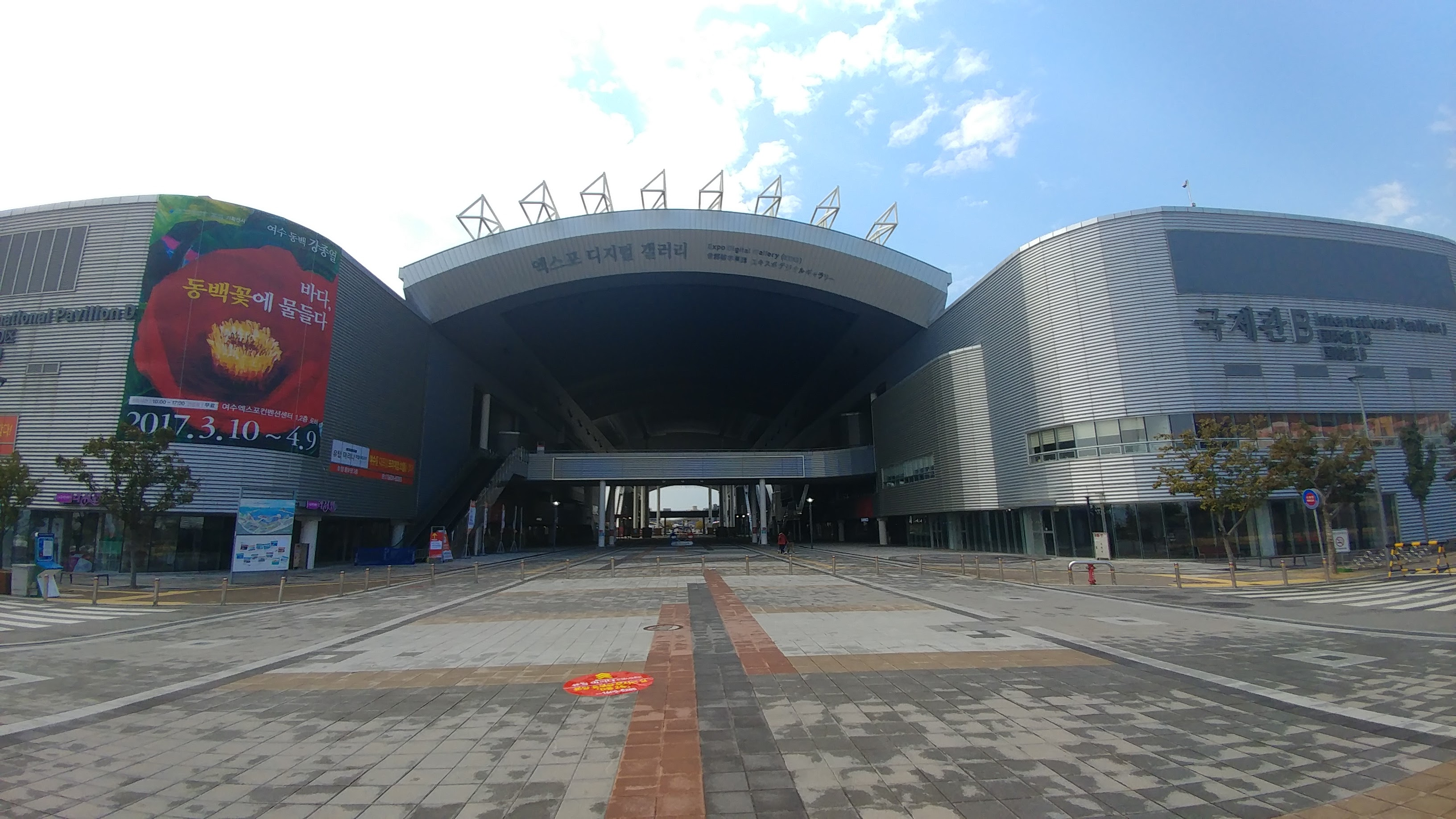 여수로 들어가는 입구